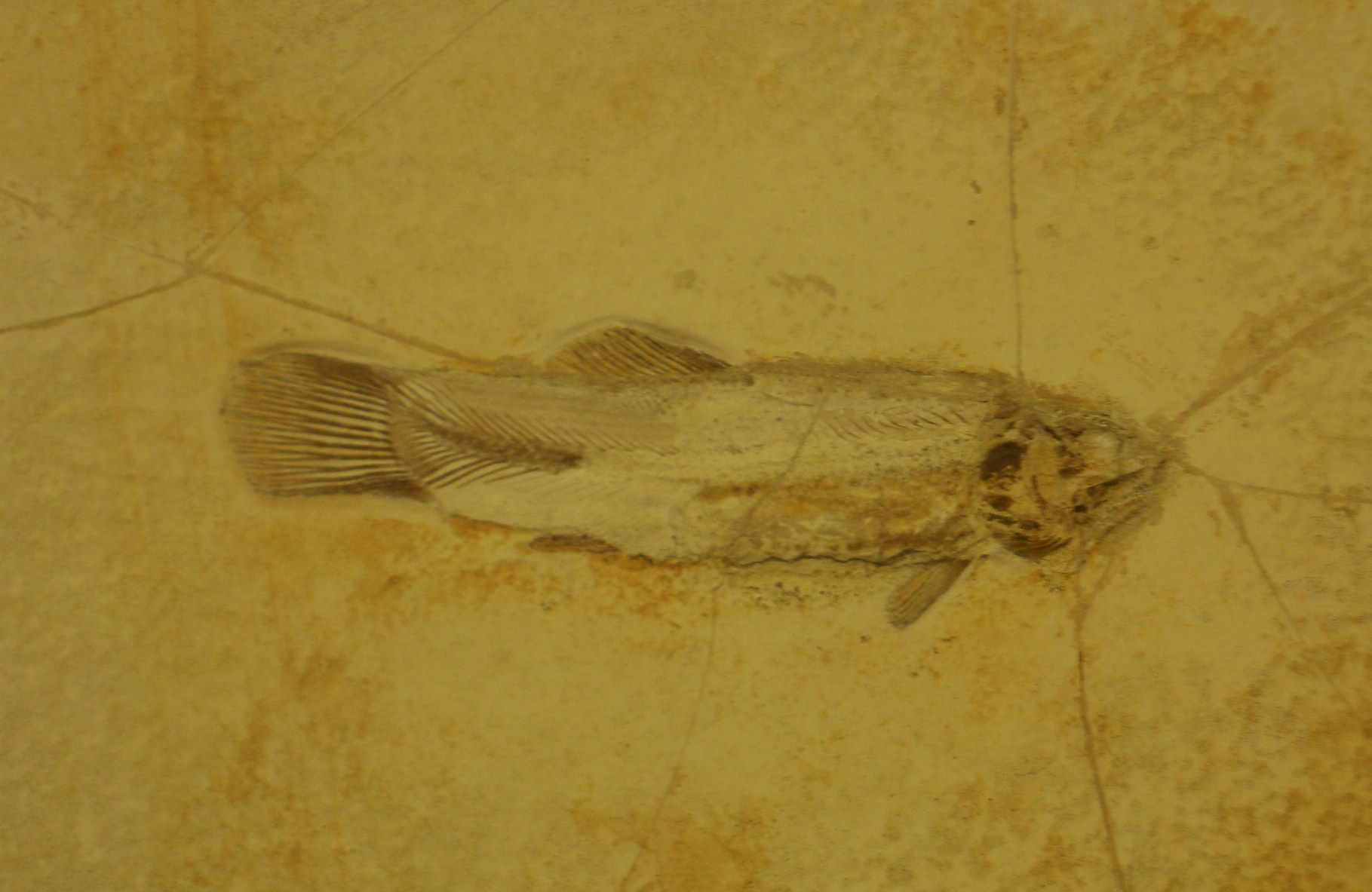 Fossil of Urocles, an extinct fish